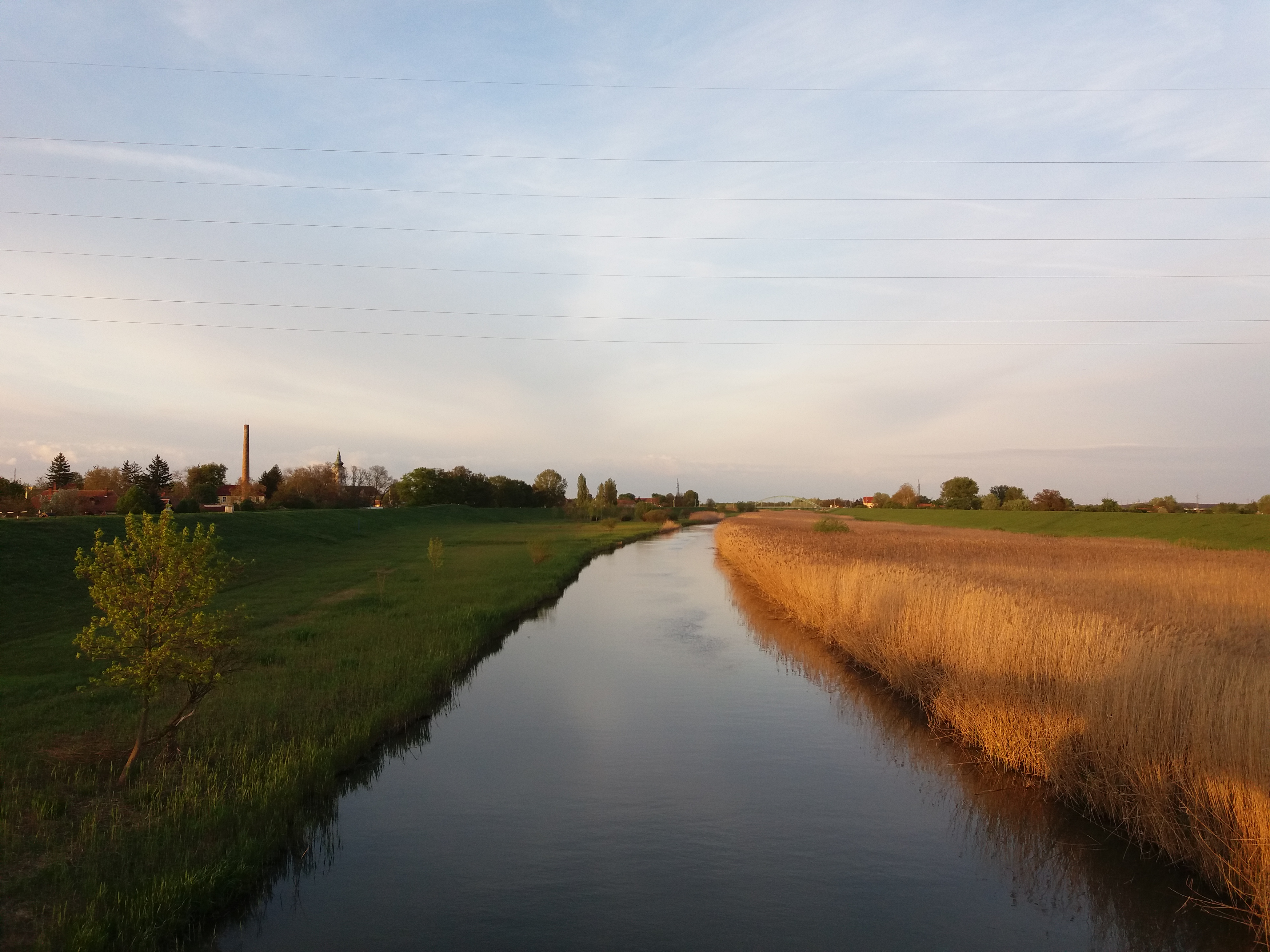 Berettyó folyó Szeghalomnál a vasútí hídról.